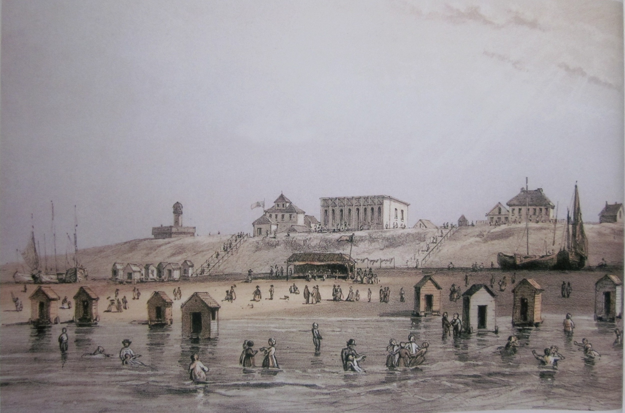 Beginjaren van het badtoerisme in Blankenberge. Lithografie van Edwin Toovey (1826-1906)